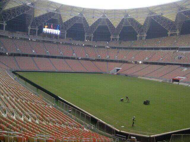 King Abdullah Sports City in Jeddah, Saudi Arabia.